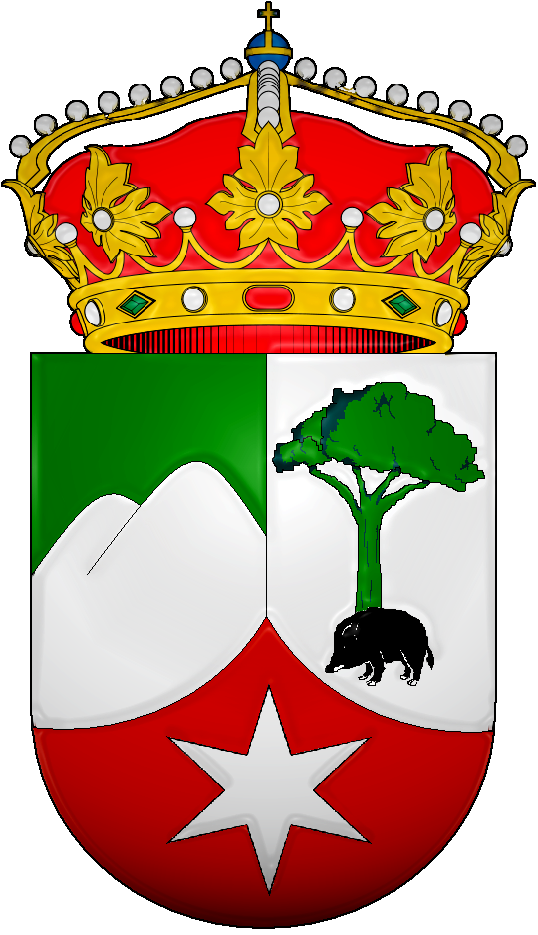 Escudo heráldico de Fontanarejo, Ciudad Real, España